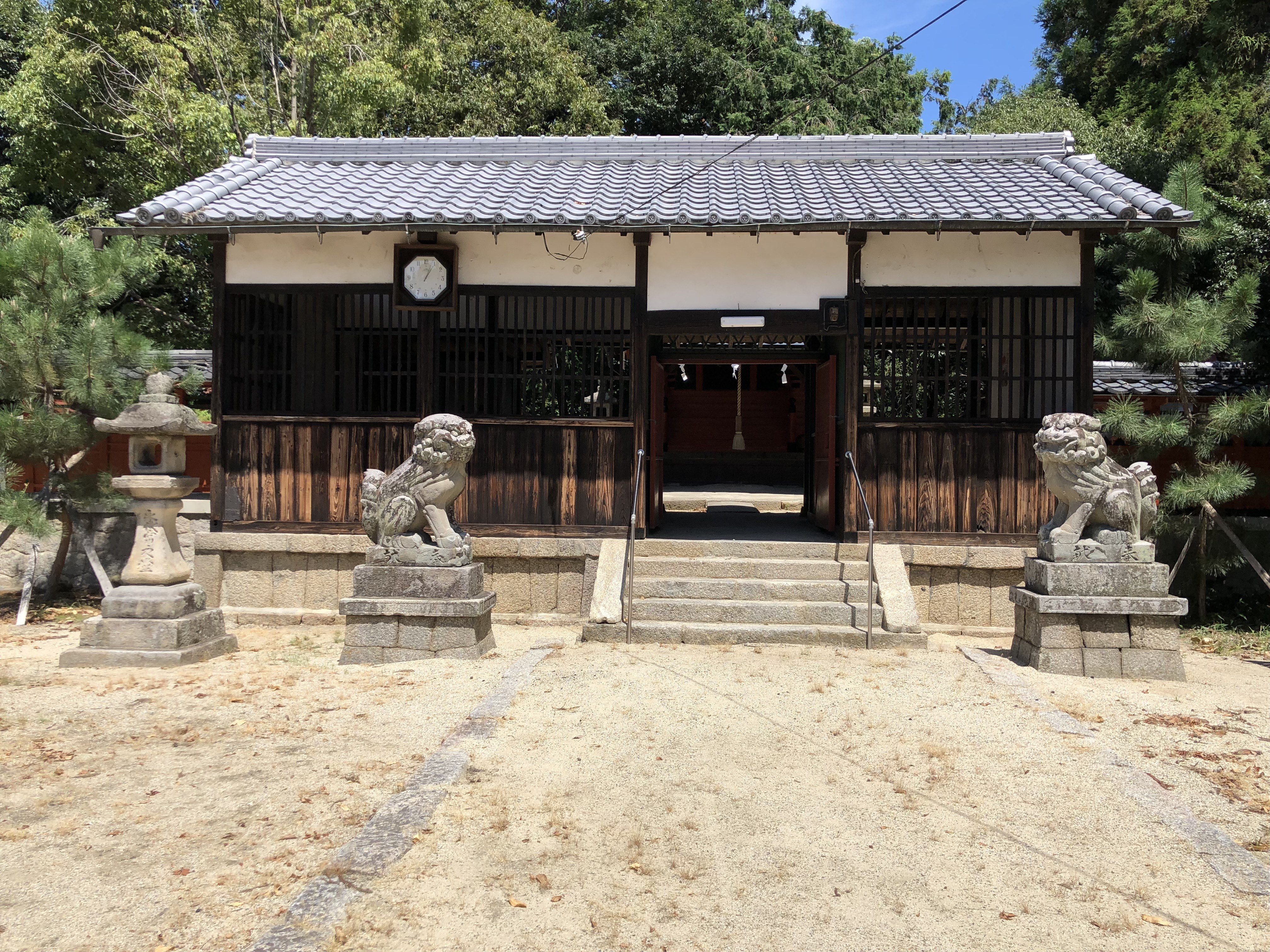 奈良県天理市櫟本 和爾下神社 境内